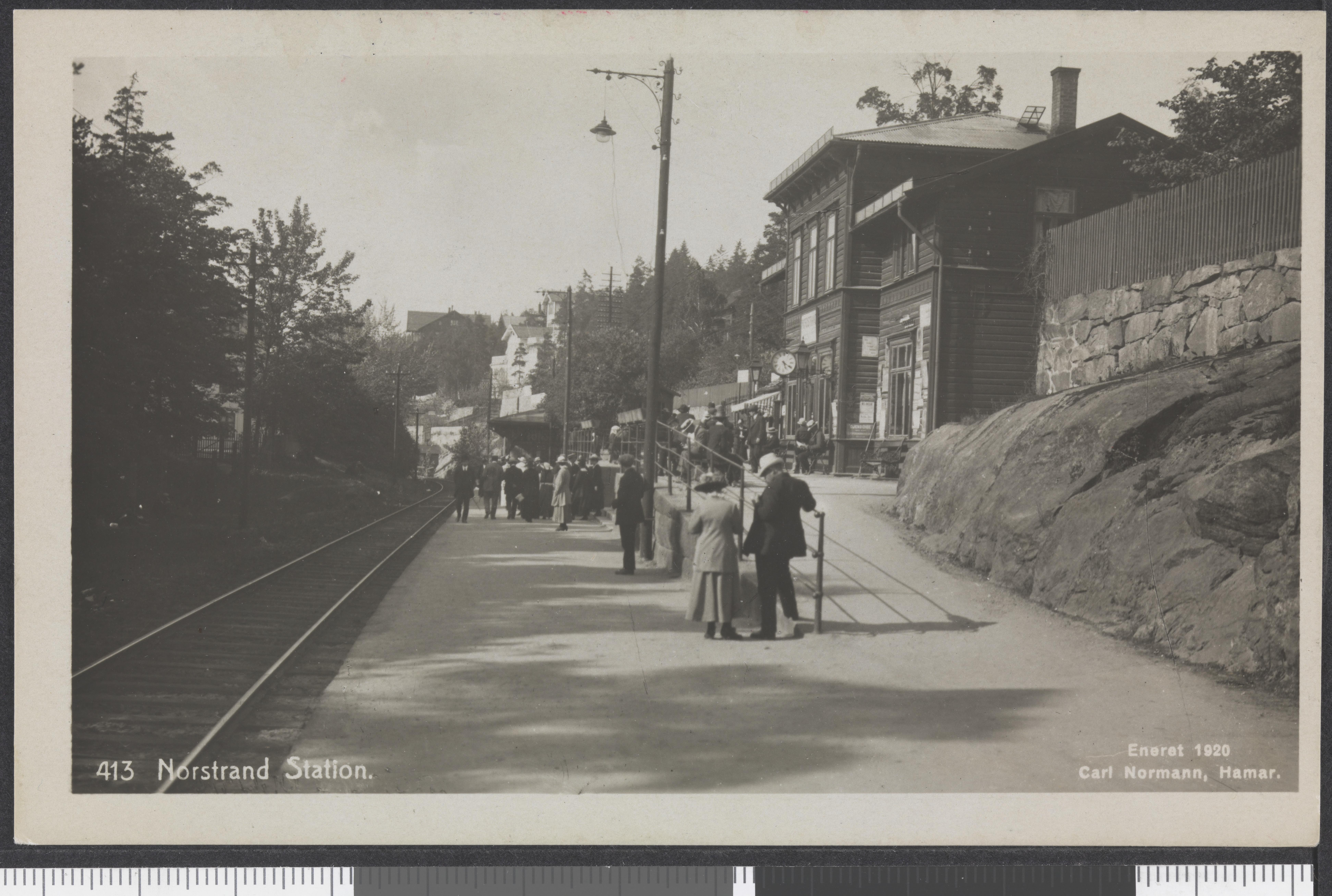 Bildet er hentet fra Nasjonalbibliotekets bildesamling Nordstrand,Nordstrand stasjon, Oslo, Oslo